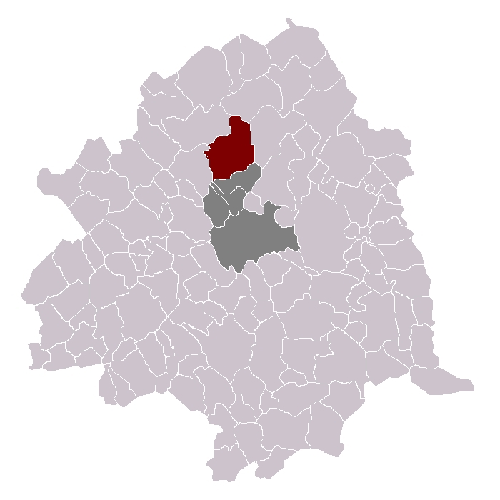 Wambrechies dans son canton et son arrondissement